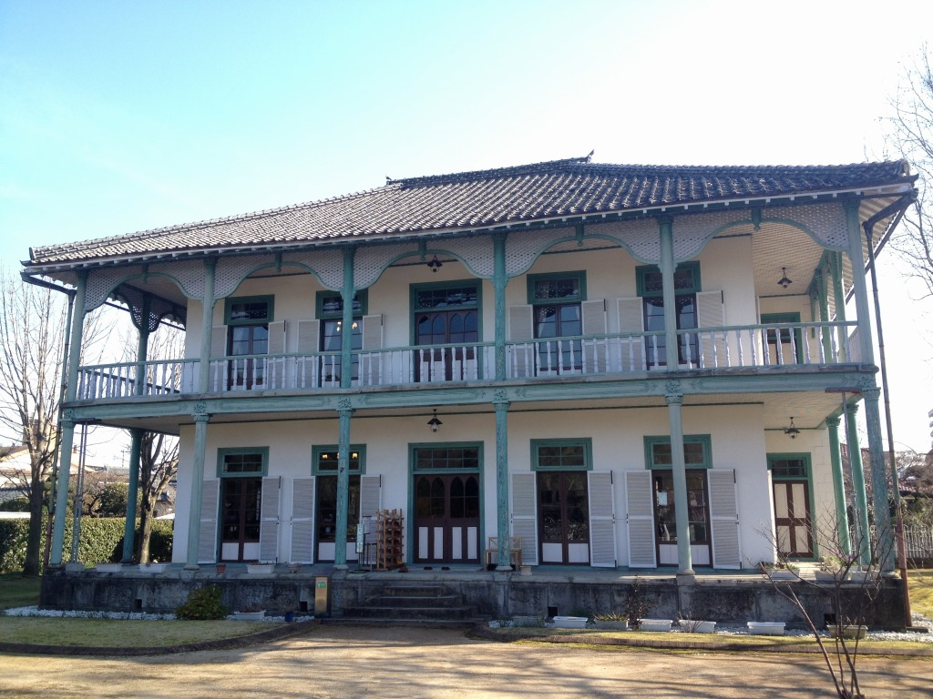 landmark in Kumamoto City